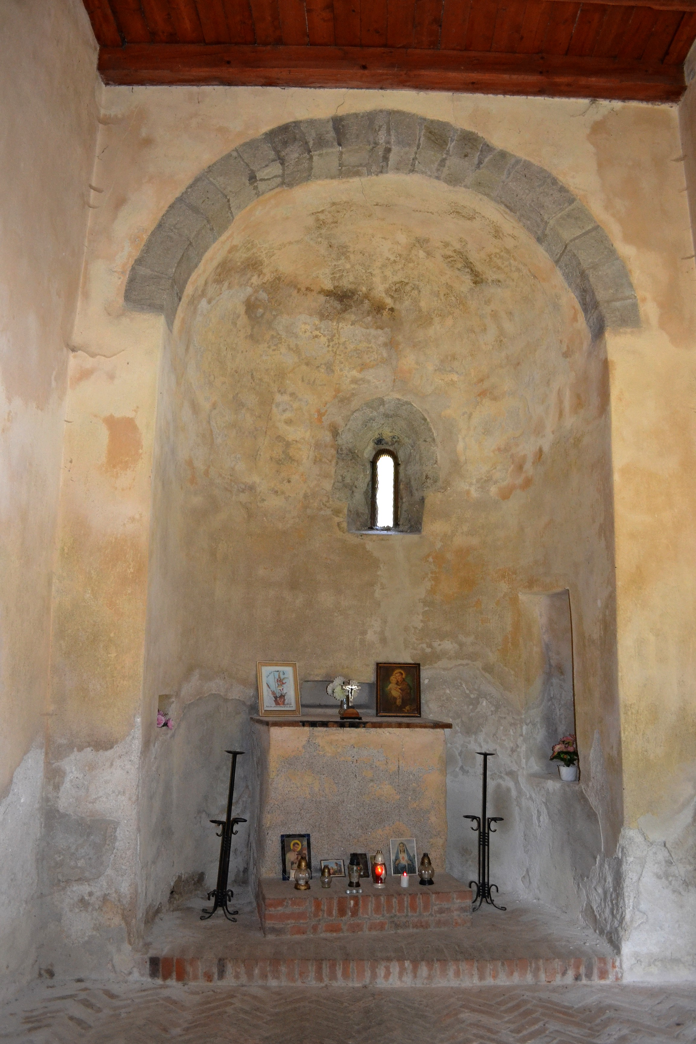 Veľký Klíž, Kostol svätého Michala archanjela v miestnej časti Klížske Hradište; pohľad do apsidy s oltárom